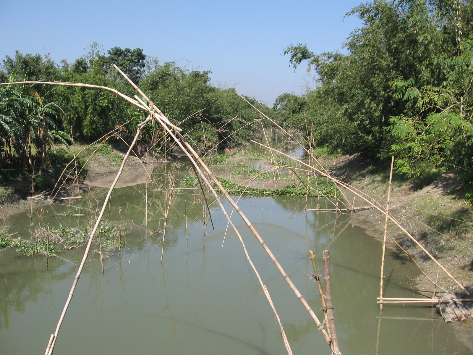 Louhajang River in Tangail District